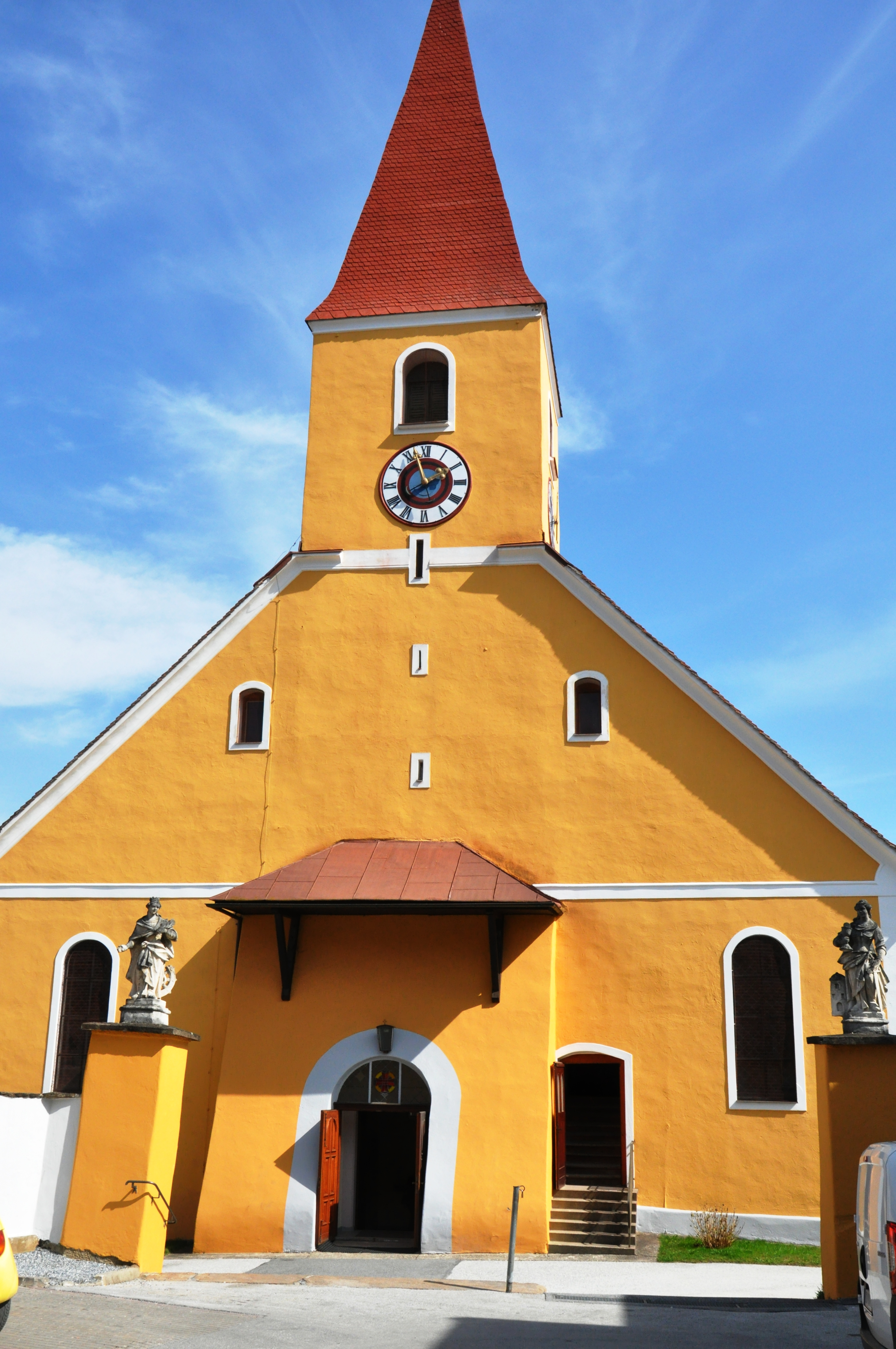 Kath. Pfarrkirche hl. Katharina und ehem. Friedhof